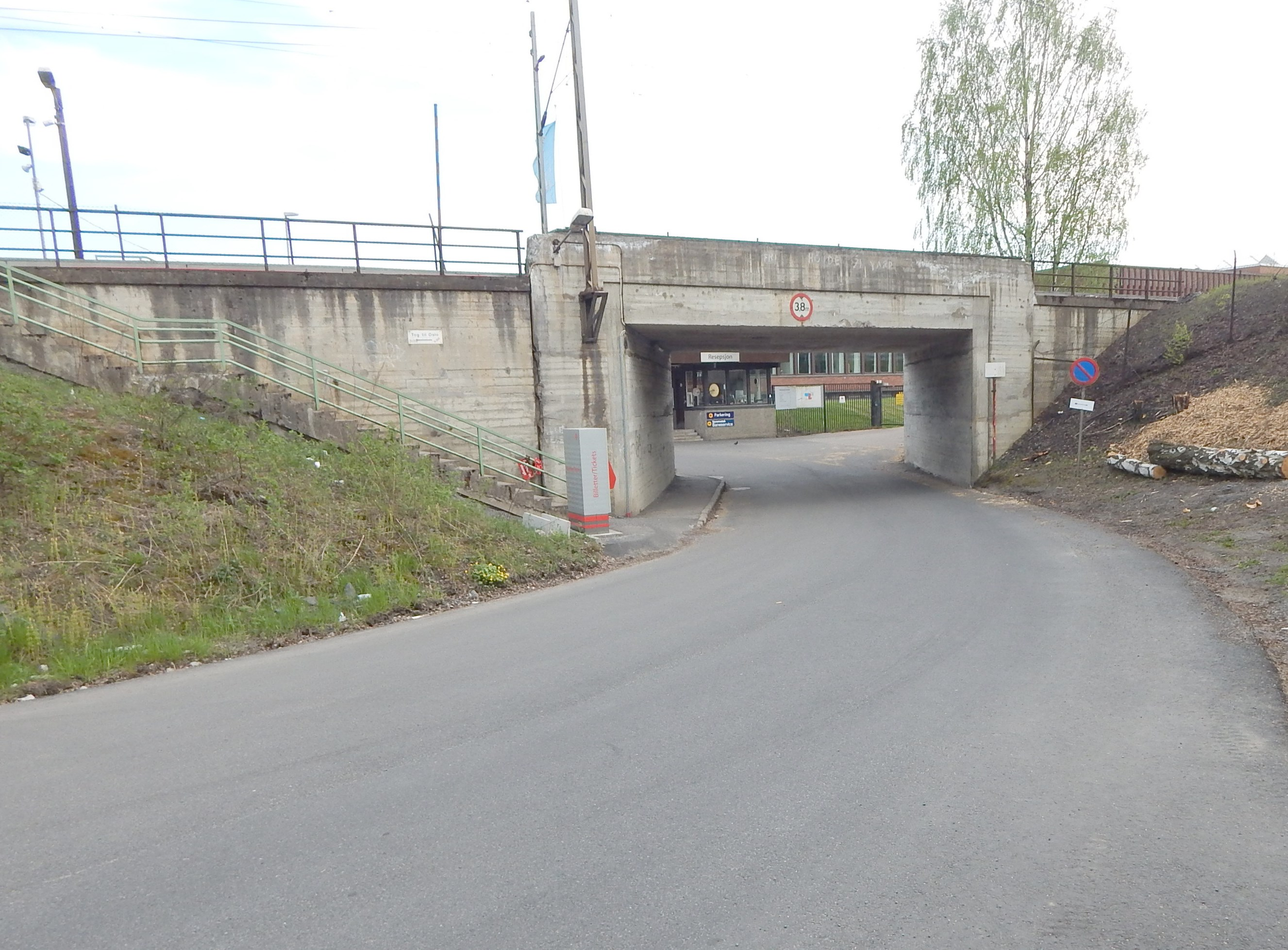 Eilert Smiths vei går under Hovedbanen ved Nyland holdeplass.